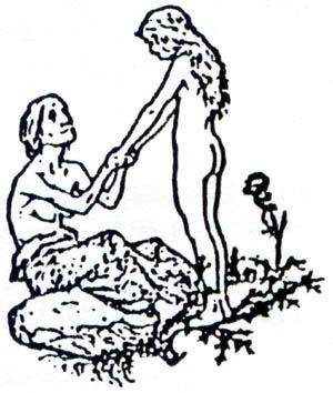 Zeichnung aus dem Programmheft der Rinnsteinlieder